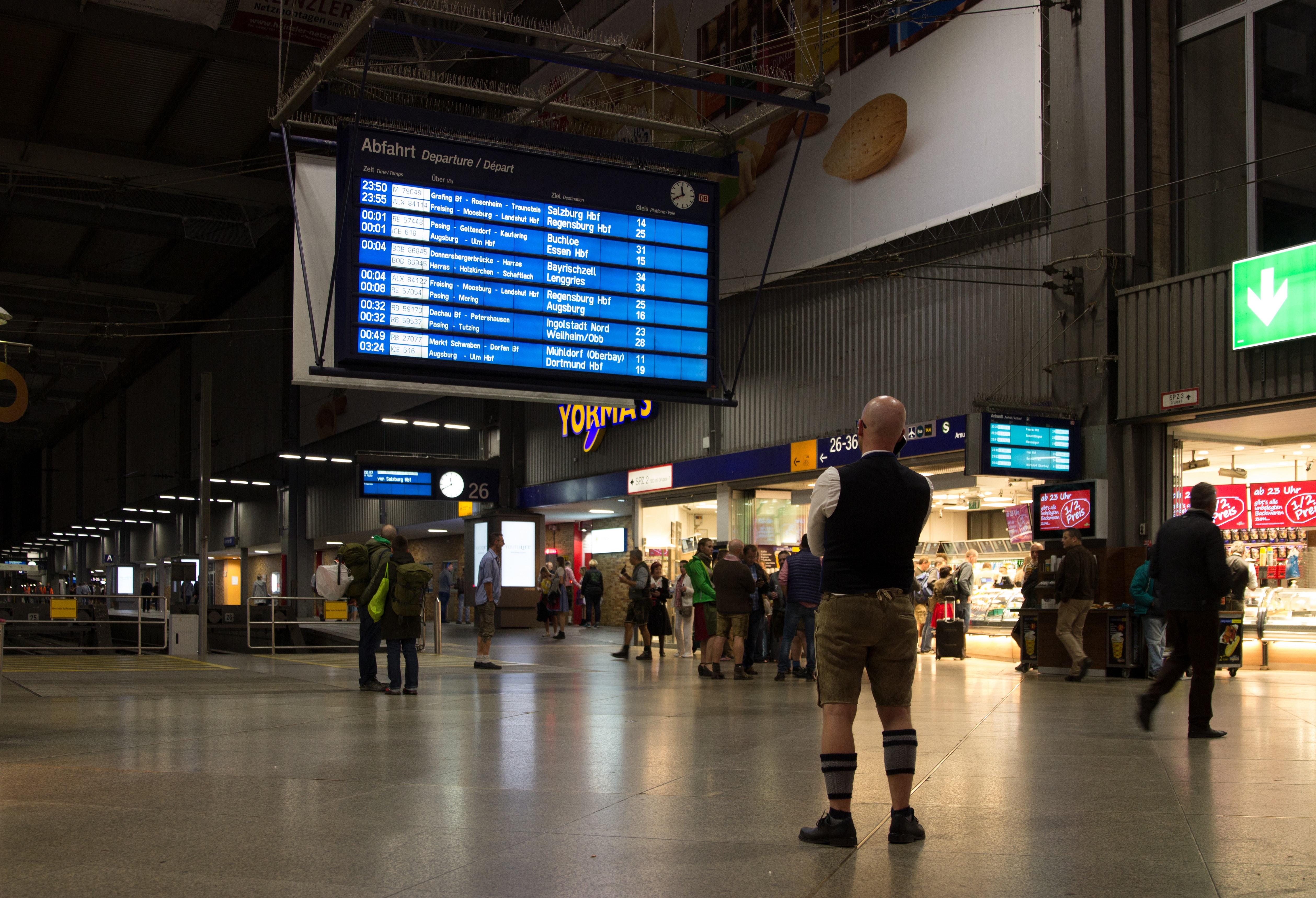 München Hbf vor Zugabfahrtsanzeige Oktoberfest-Stimmung